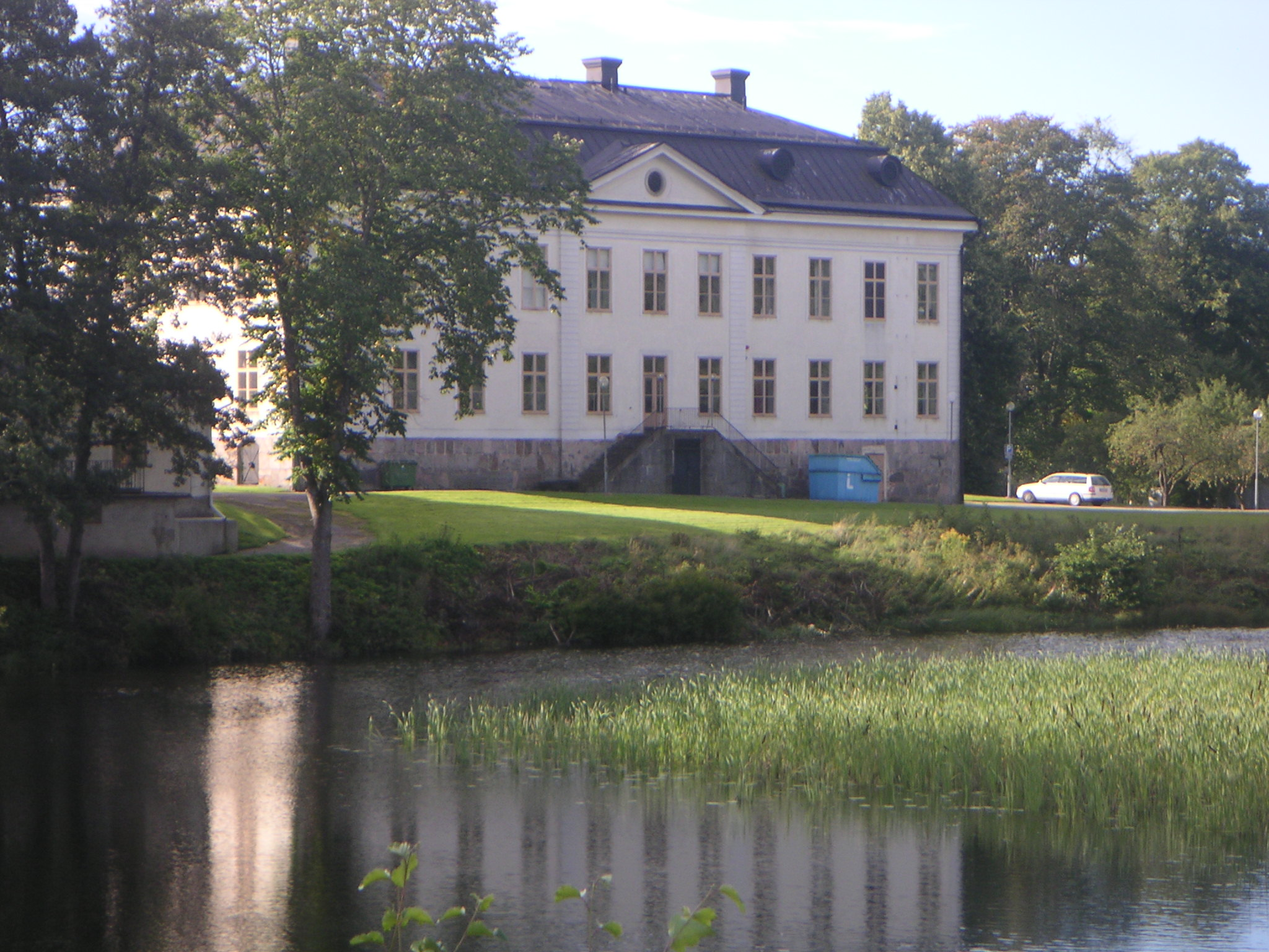 Skinnskattebergs herrgård - säte för Skogsmästarskolan